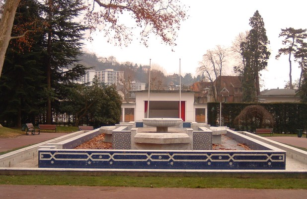 Fontaine marocaine dans la station thermale d'Aix-les-Bains en France dans le département de la Savoie. Cette fontaine fut inaugurée pour rappeler les négociations qui eurent lieu dans la ville pour l'indépendance du Maroc.